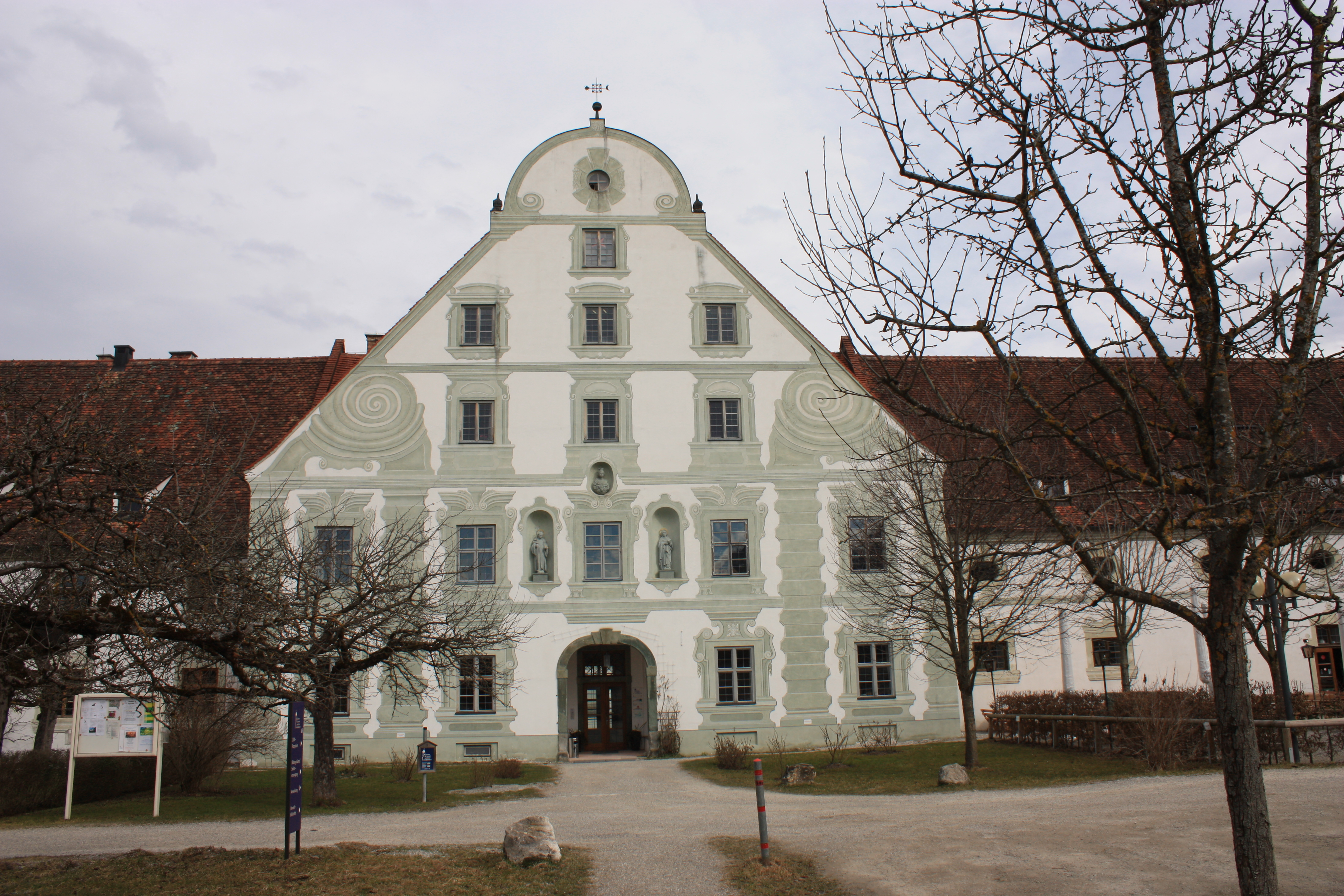 Mittelrisalit Maierhof, Kloster Benediktbeuern, Zentrum für Umwelt und Kultur Benediktbeuern